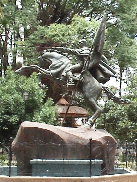 Momumenteo a Esteban Arze en la plaza principal de la Ciudad de Tarata.